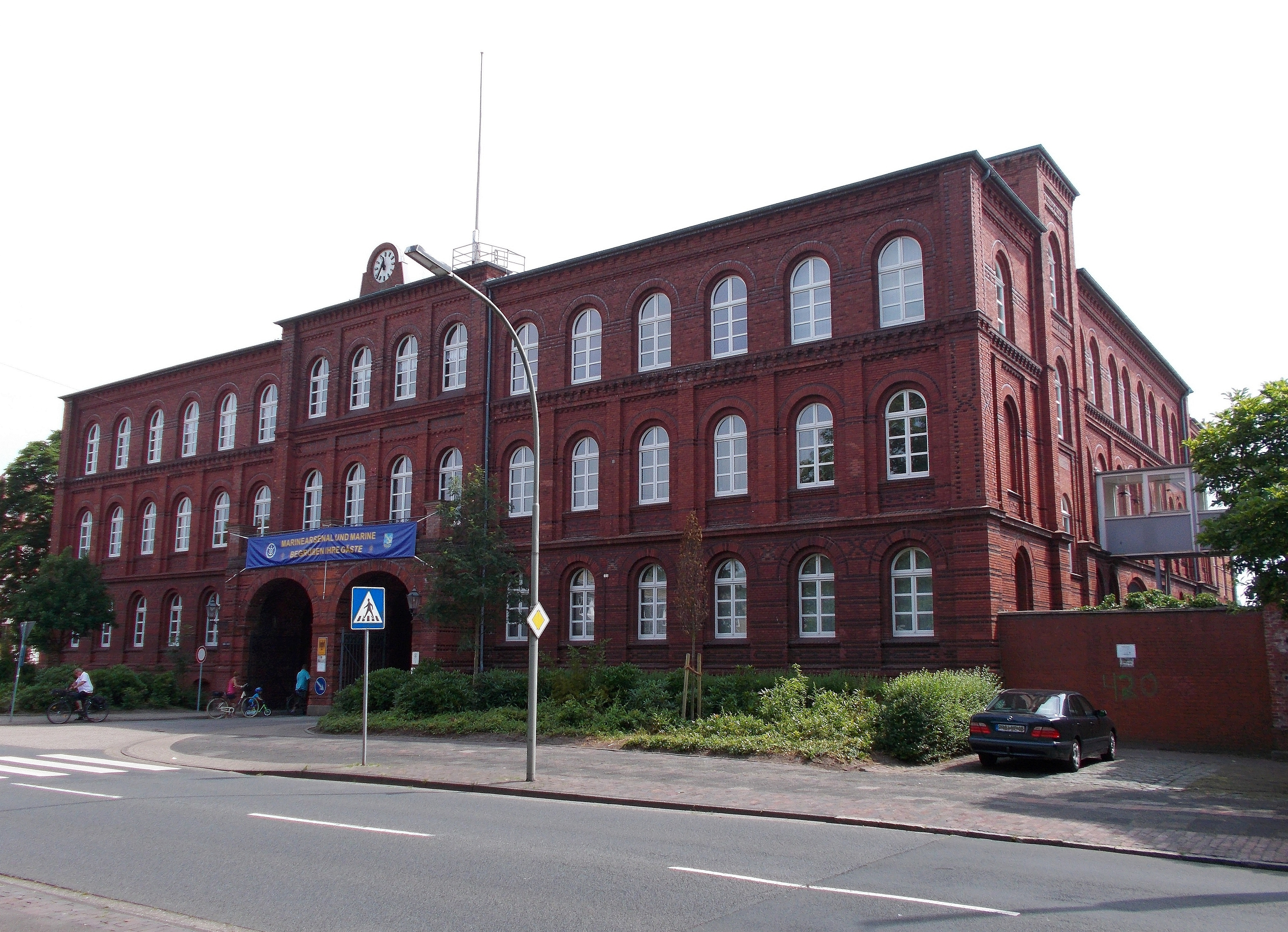 Werfttor 1 in Wilhelmshaven. Backsteinbau mit rundbogigem Doppeltor (Anno 1876). Haupttor zur früheren Kaiserlichen Werft, dem heutigen Marinearsenal.